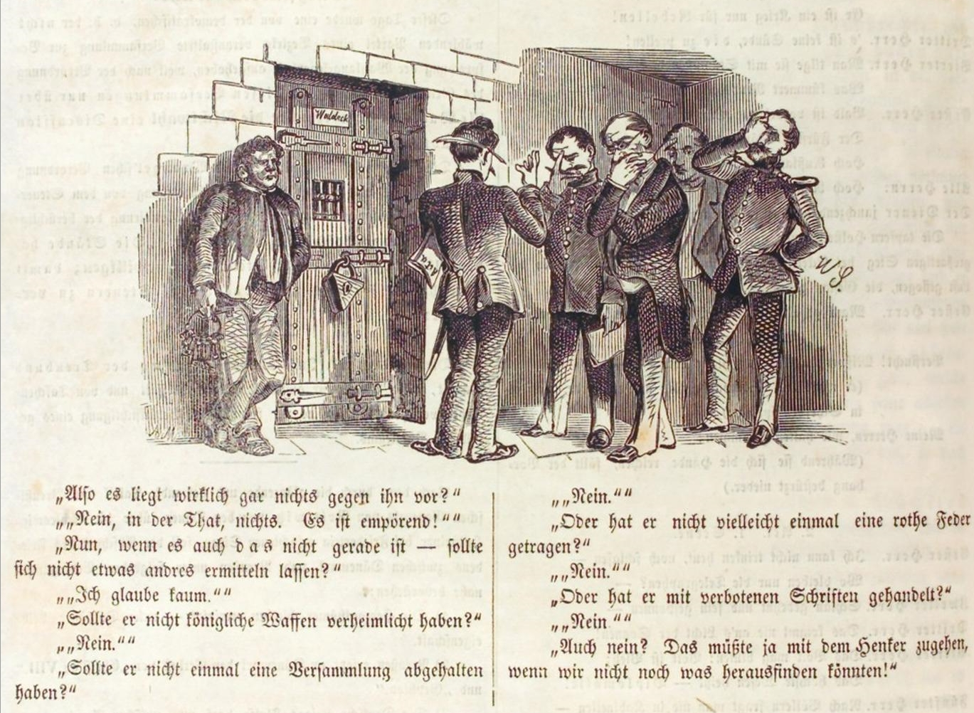 Satire zur Inhaftierung von Franz Leo Benedikt Waldeck in der Zeitschrift Kladderadatsch vom 15.6.1849